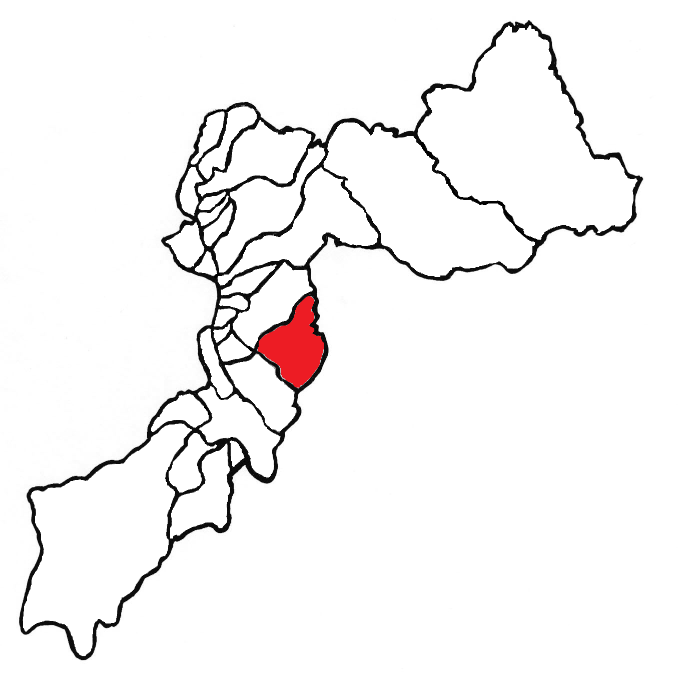 Ubicación del distrito en la provincia de Huancayo, departamento de Junín, Perú